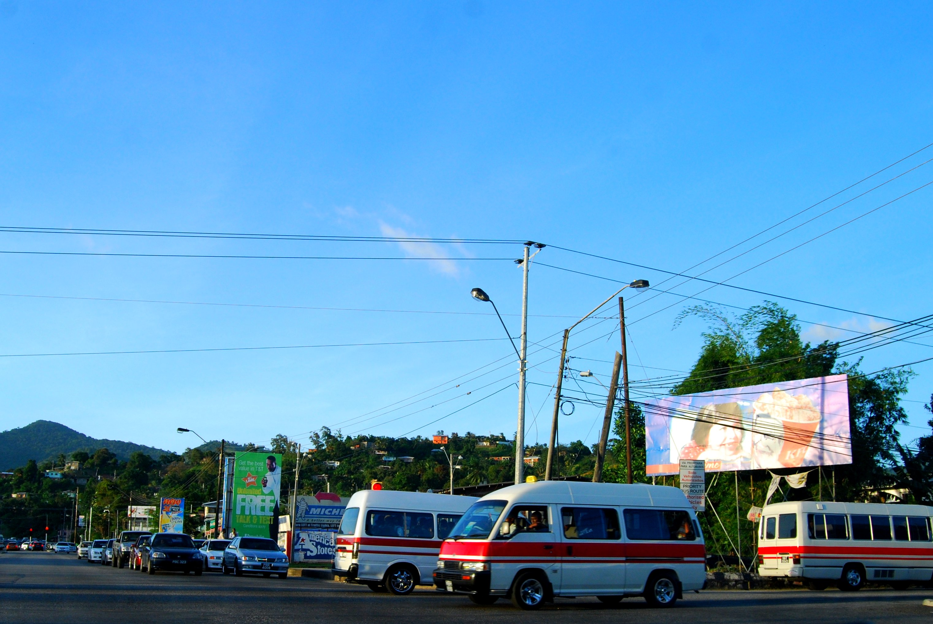 Transport en commun à Trinidad, Cuba.